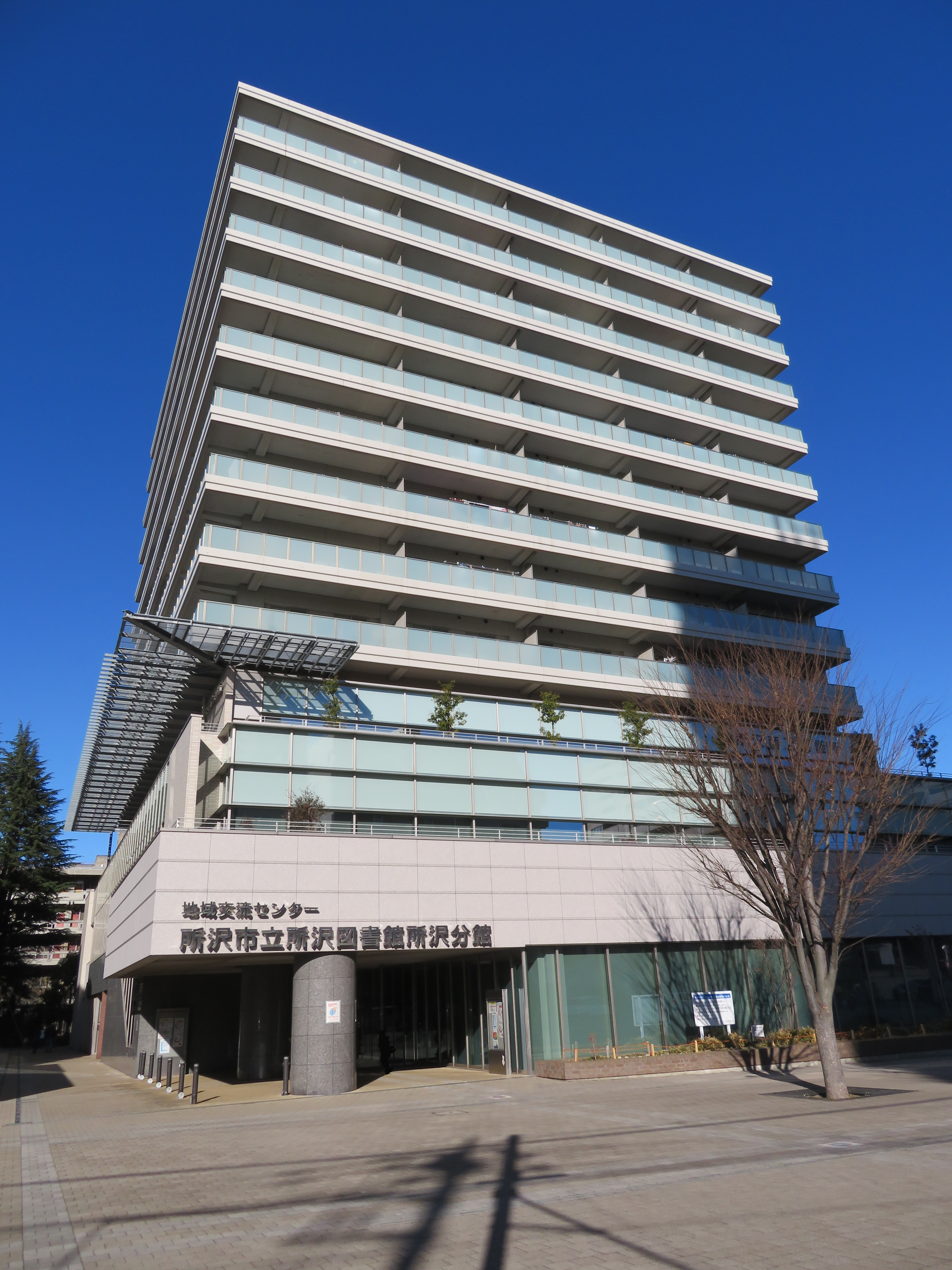 埼玉県所沢市に所在する所沢市立所沢図書館所沢分館(所沢ハーティア東棟) Canon PowerShot SX720 HS